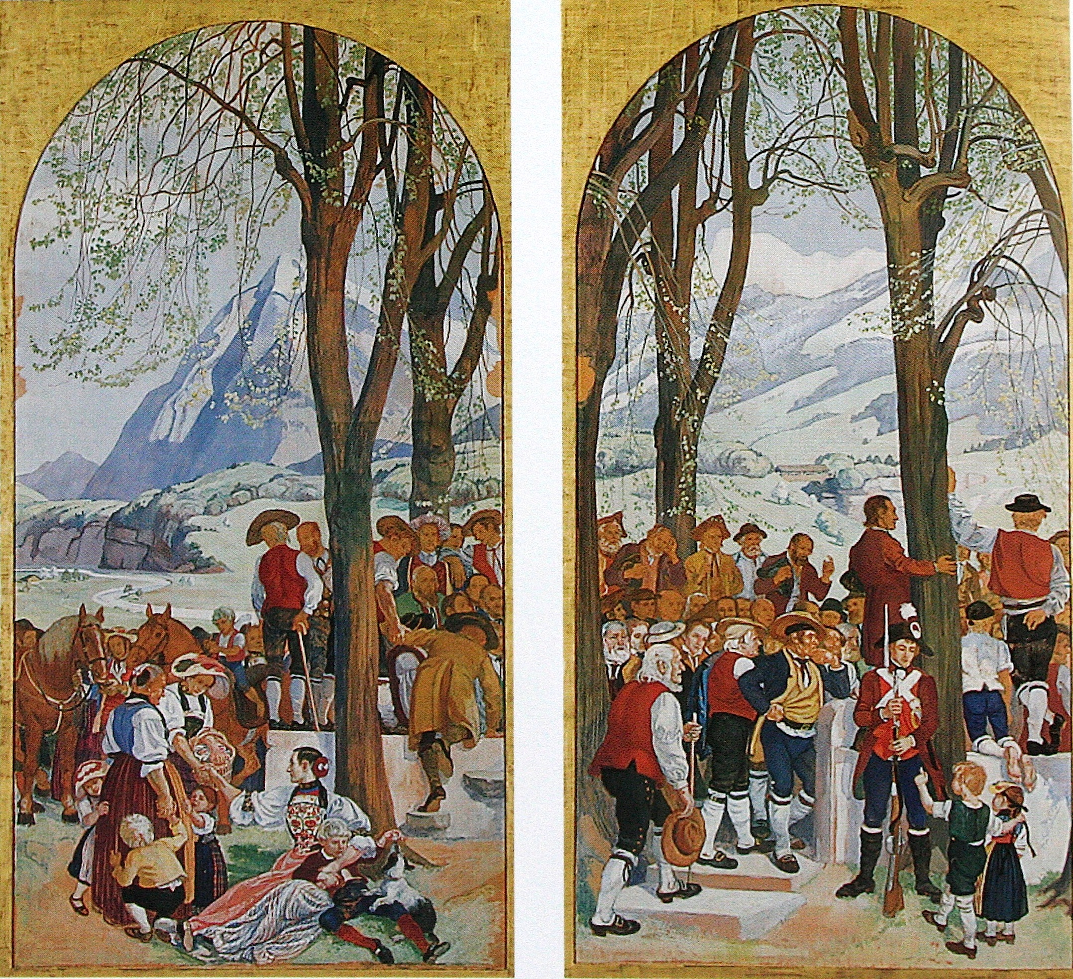 Landsgemeinde, linker Teil, Gemälde von Albert Welti, 1910/12,fünf Felder, je 273 x 144 cm, Guache auf Papier auf Leinwand, Kunsthaus Zürich, Eigentum der Schweizerischen Eidgenossenschaft. Das Original befindet sich im Ständeratssaal des Bundeshauses in Bern.